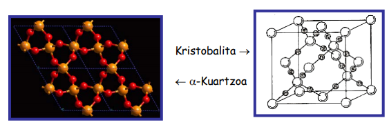 Kristobalita eta α-kuartzoaren egitura